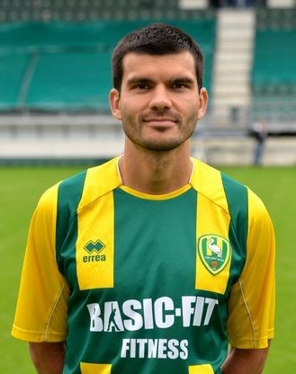 Aleksandar Radosavljevič